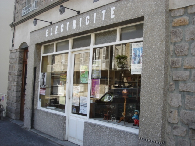 Boutique de materiel élécrique à Vic-sur-Cère